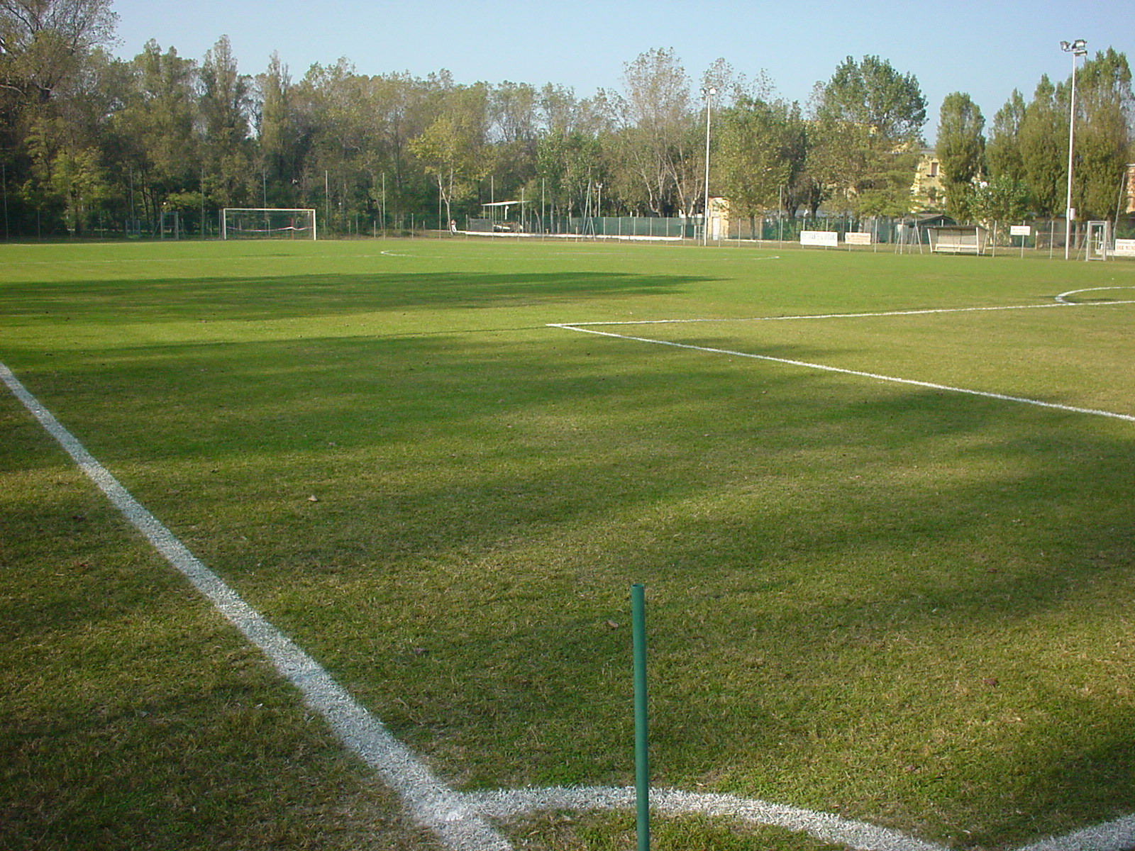 EuroCamp Cesenatico : Campo Calcio Ponente